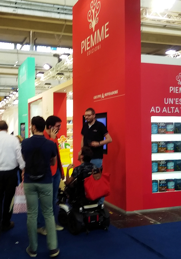 Salone del libro 2018 stand Piemme